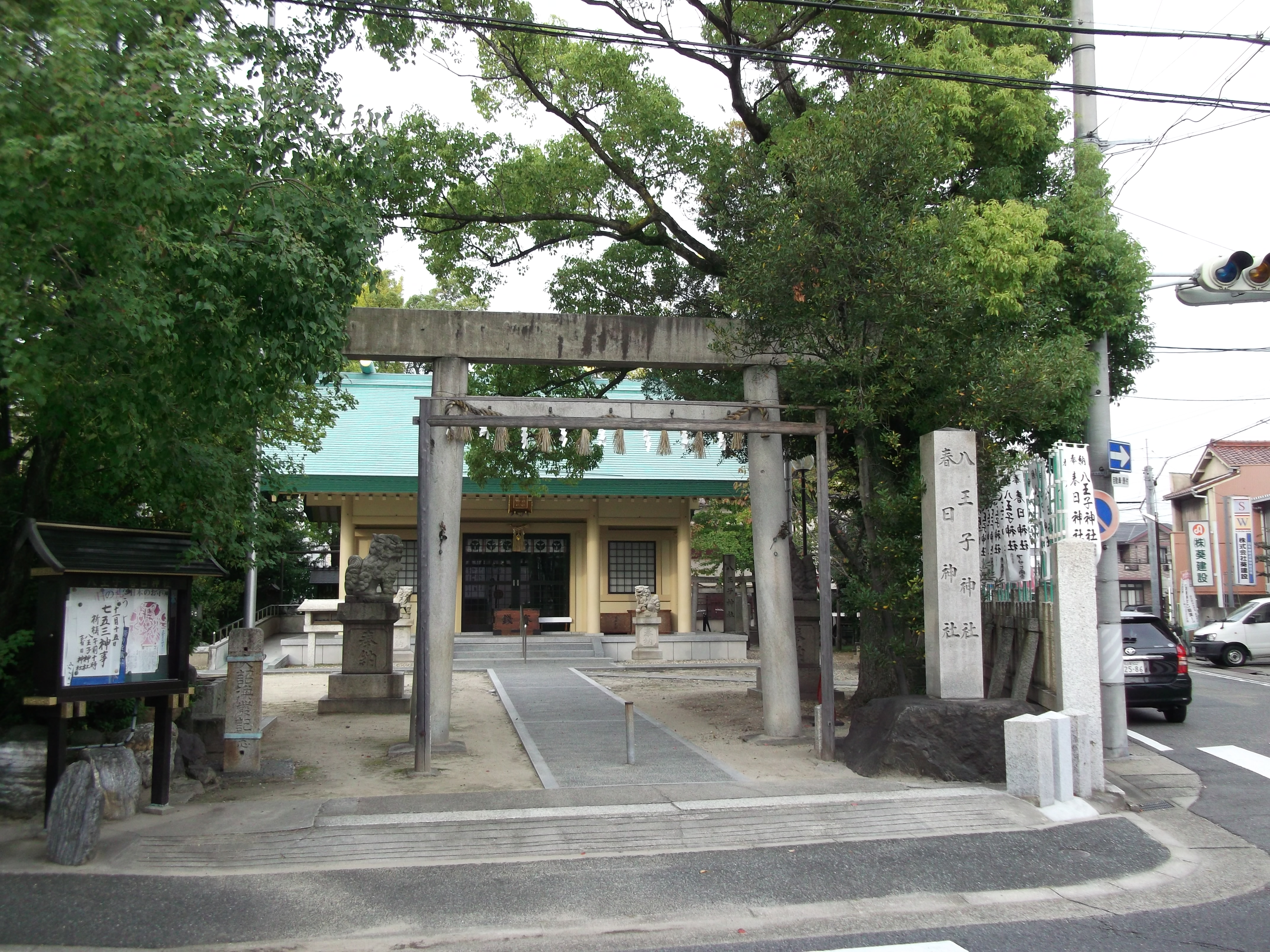 名古屋市北区清水二丁目に鎮座する八王子春日神社を南側公道より写す